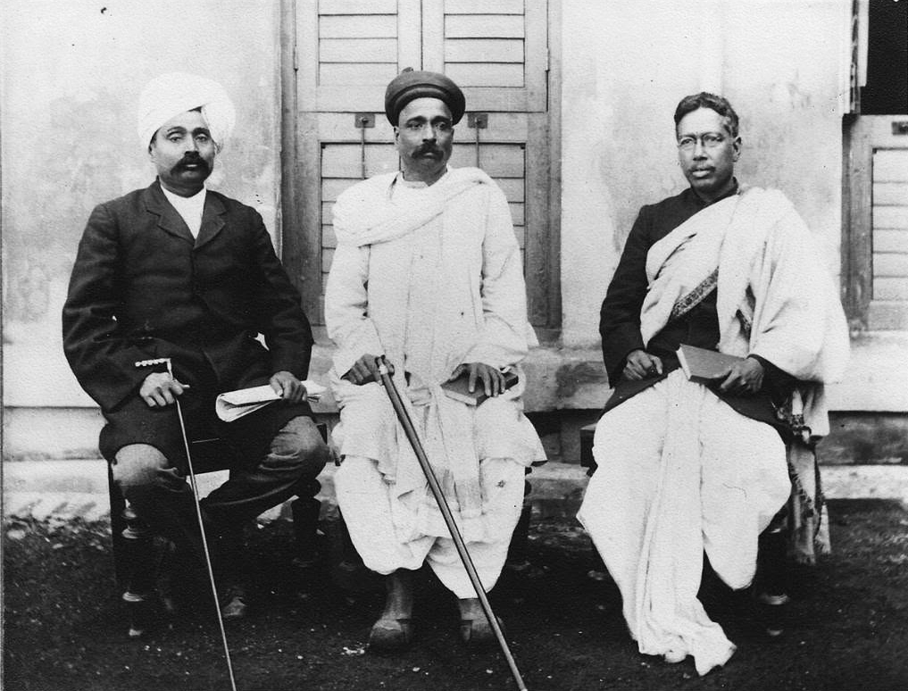 Bal Gangadhar Tilak, Lala Lajpat Rai and Bipinchandra Pal